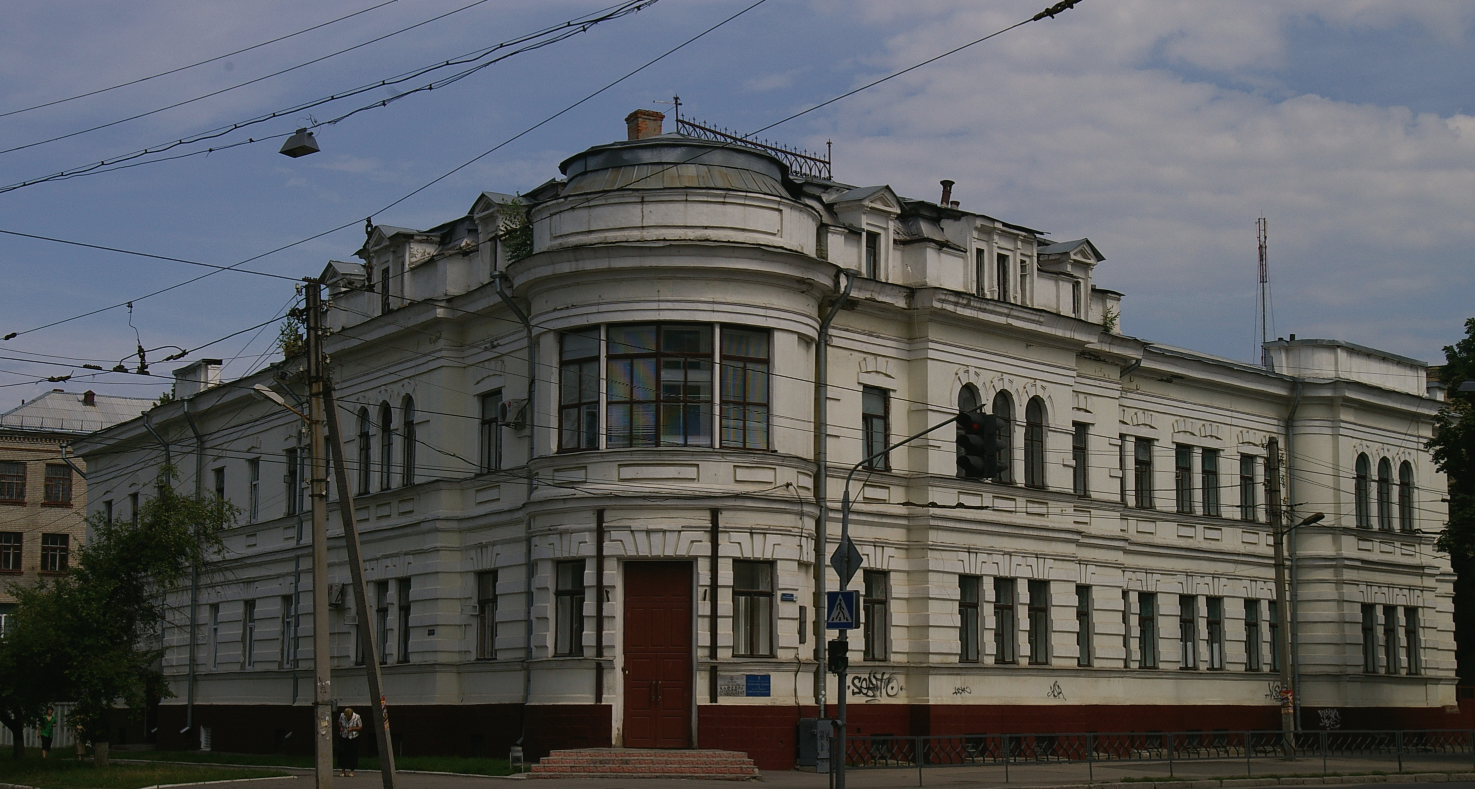 Харьков